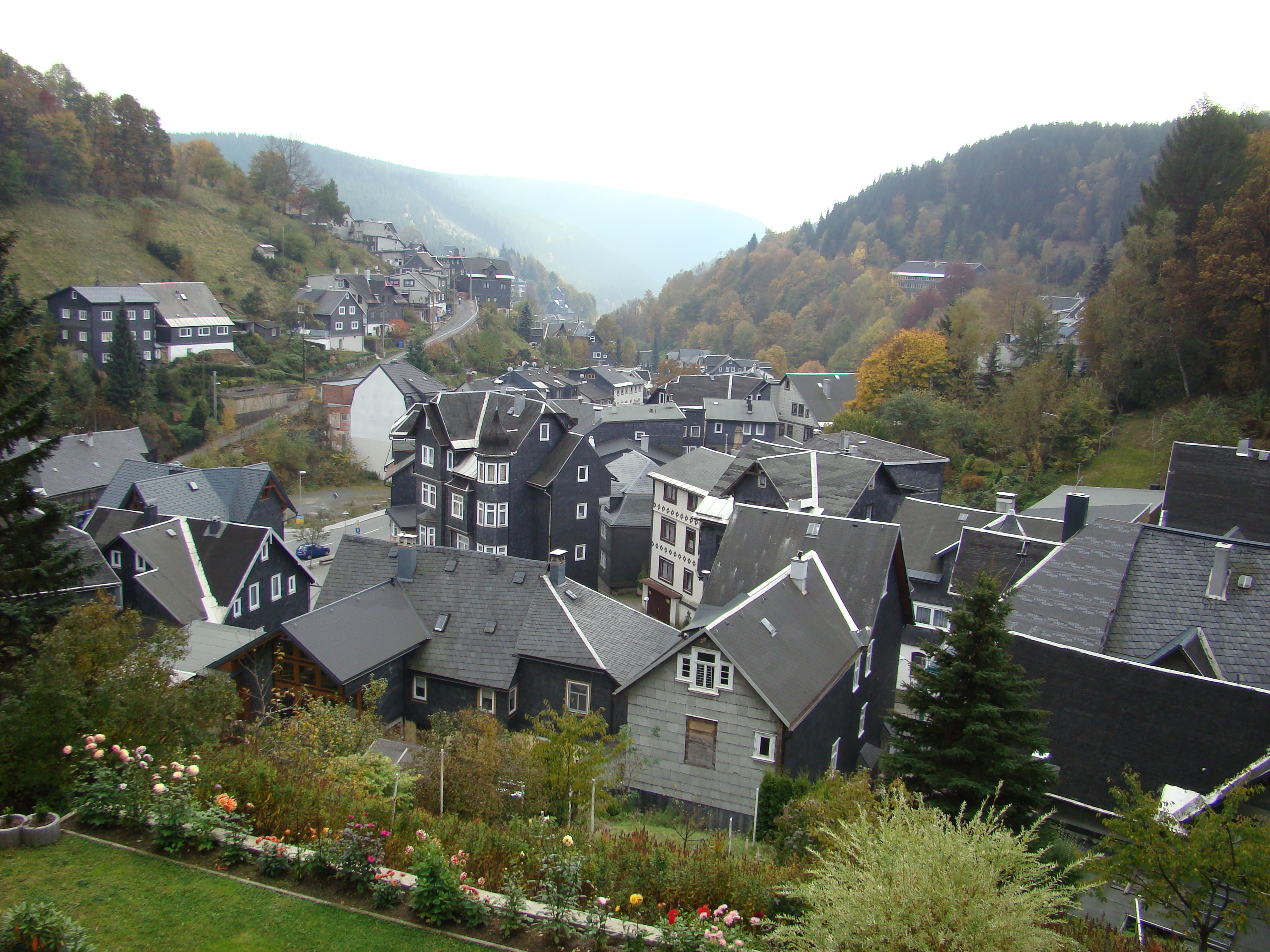 Schieferbeschlagene und Schiefergedeckte Häuser in Lauscha